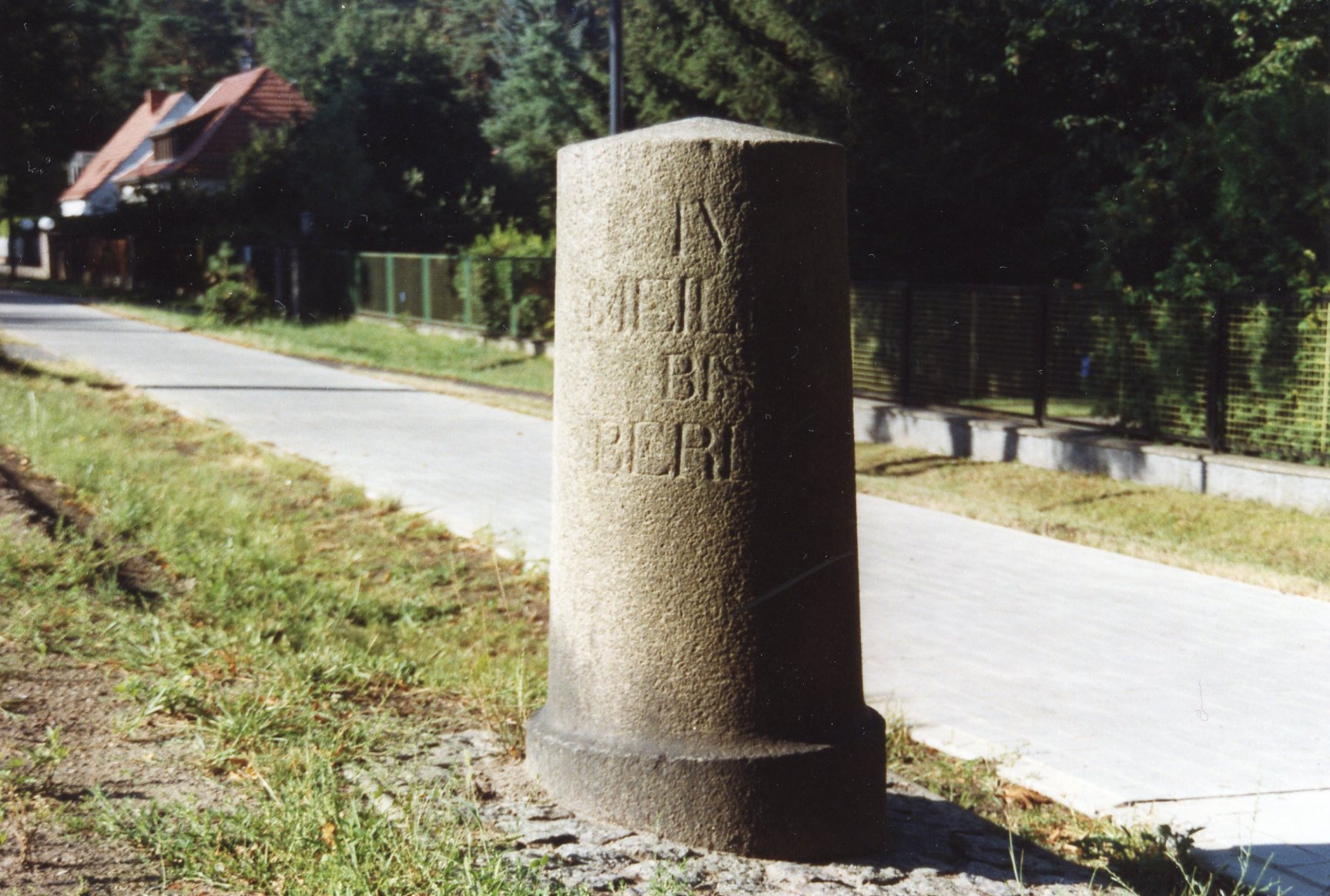 Postdistanzsäule in Wandlitz (Ort)